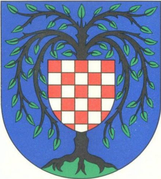 Wappen von Birkenfeld (Nahe)